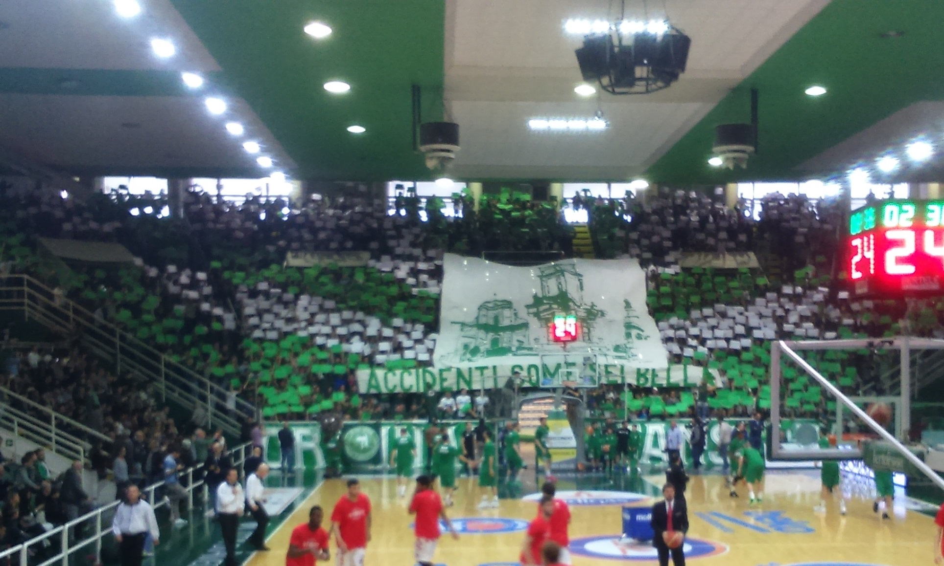 Gli Original Fans durante Avellino - Pistoia